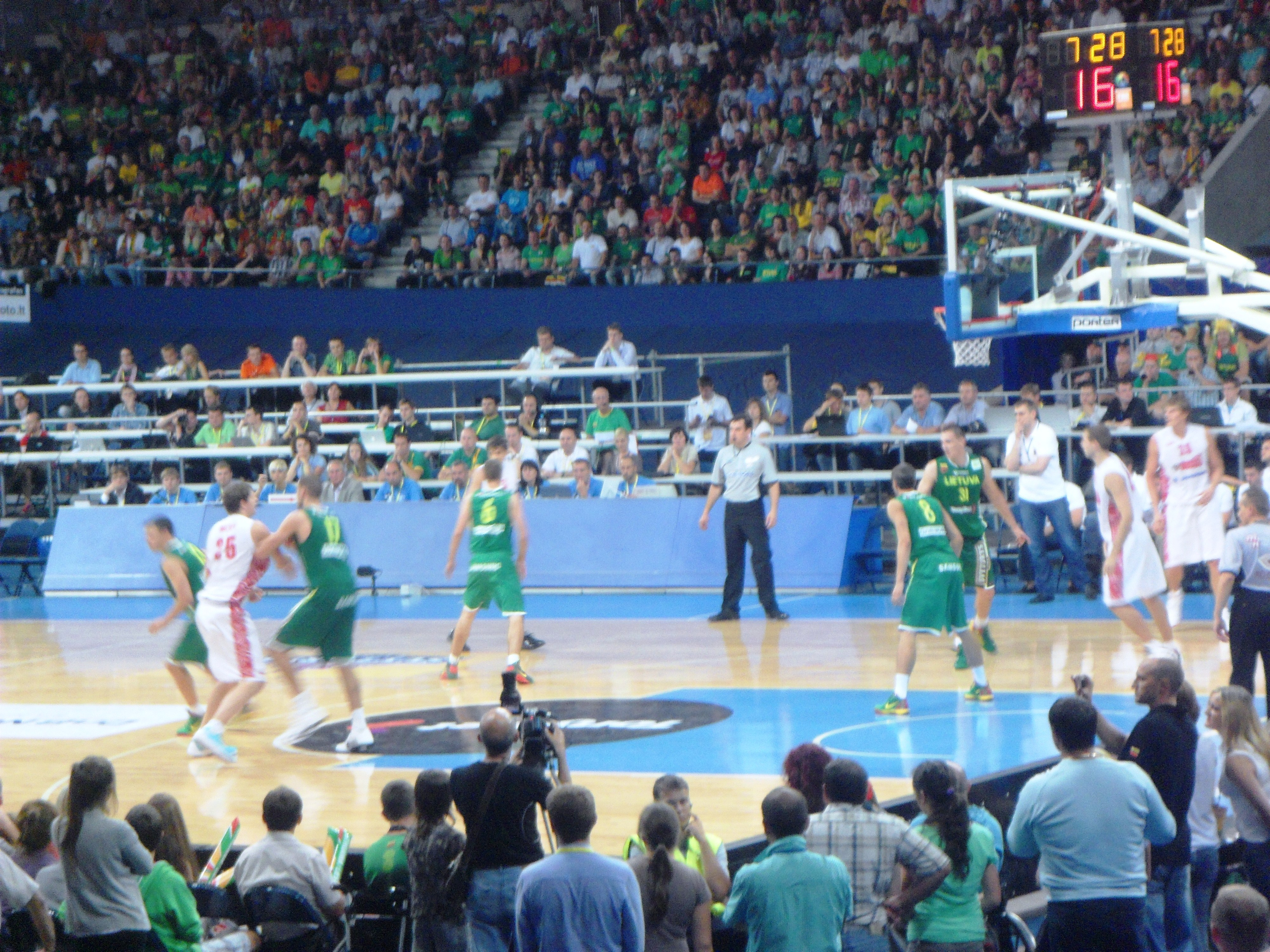 Panevėžio "Cido" arena, po varžybų Lietuva-Rusija